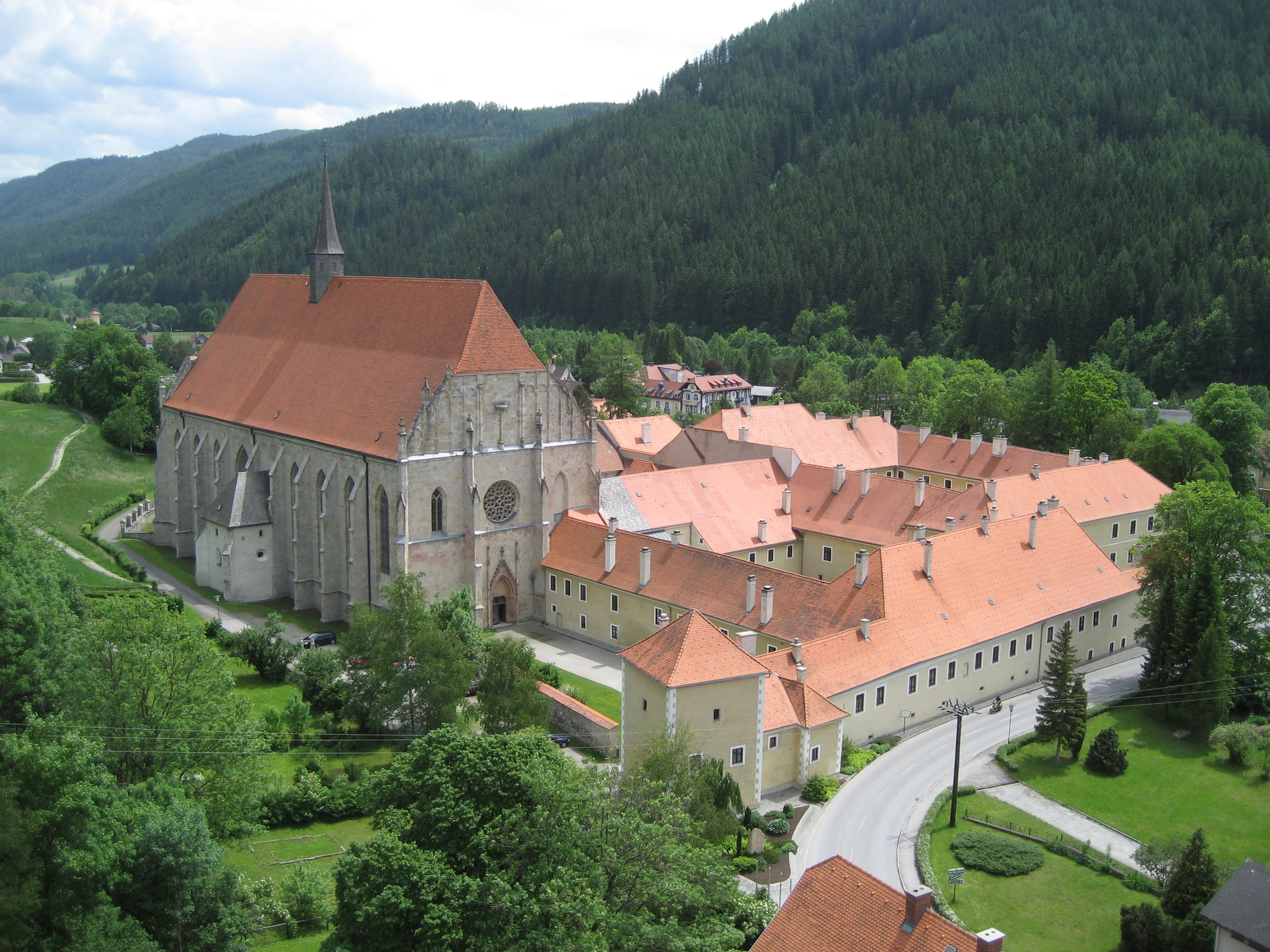 Ehemaliges Stift Neuberg an der Mürz, Steiermark, Österreich (Neuberg an der Mürz, Styria, Austria)